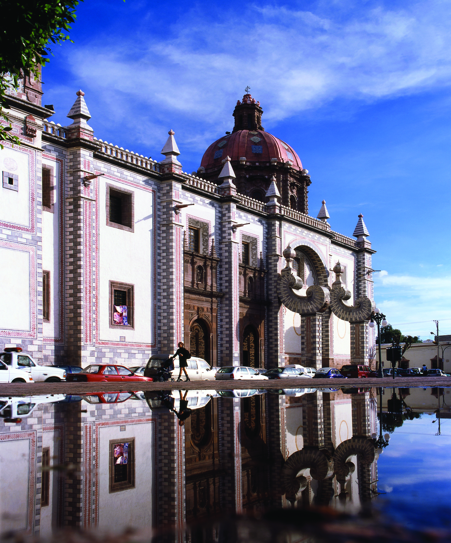 Templo de Santa Rosa de Viterbo, Santiago de Querétaro, Querétaro/ Santa Rosa de Viterbo temple